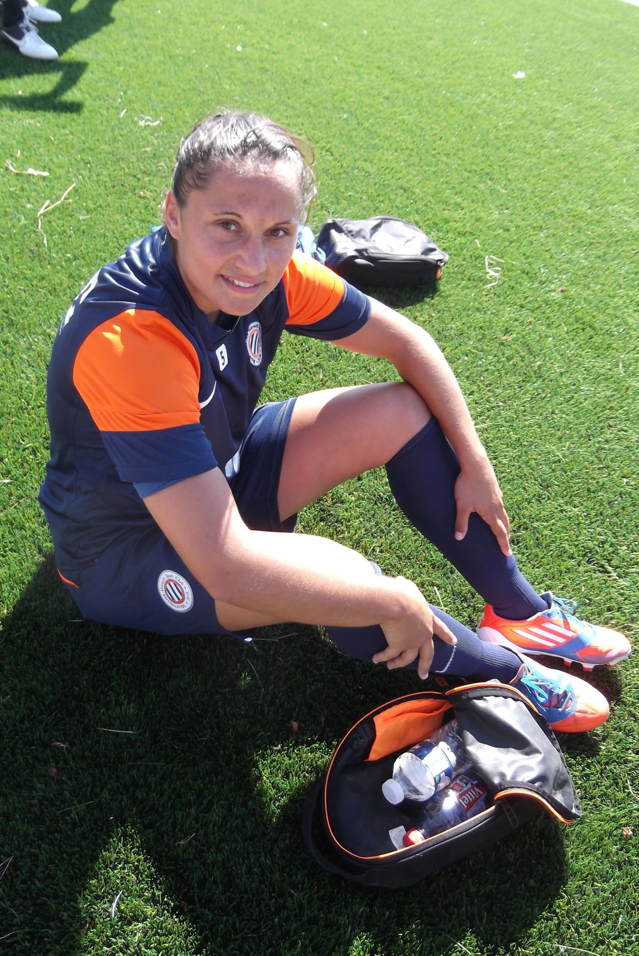 Ophélie Meilleroux, août 2013.